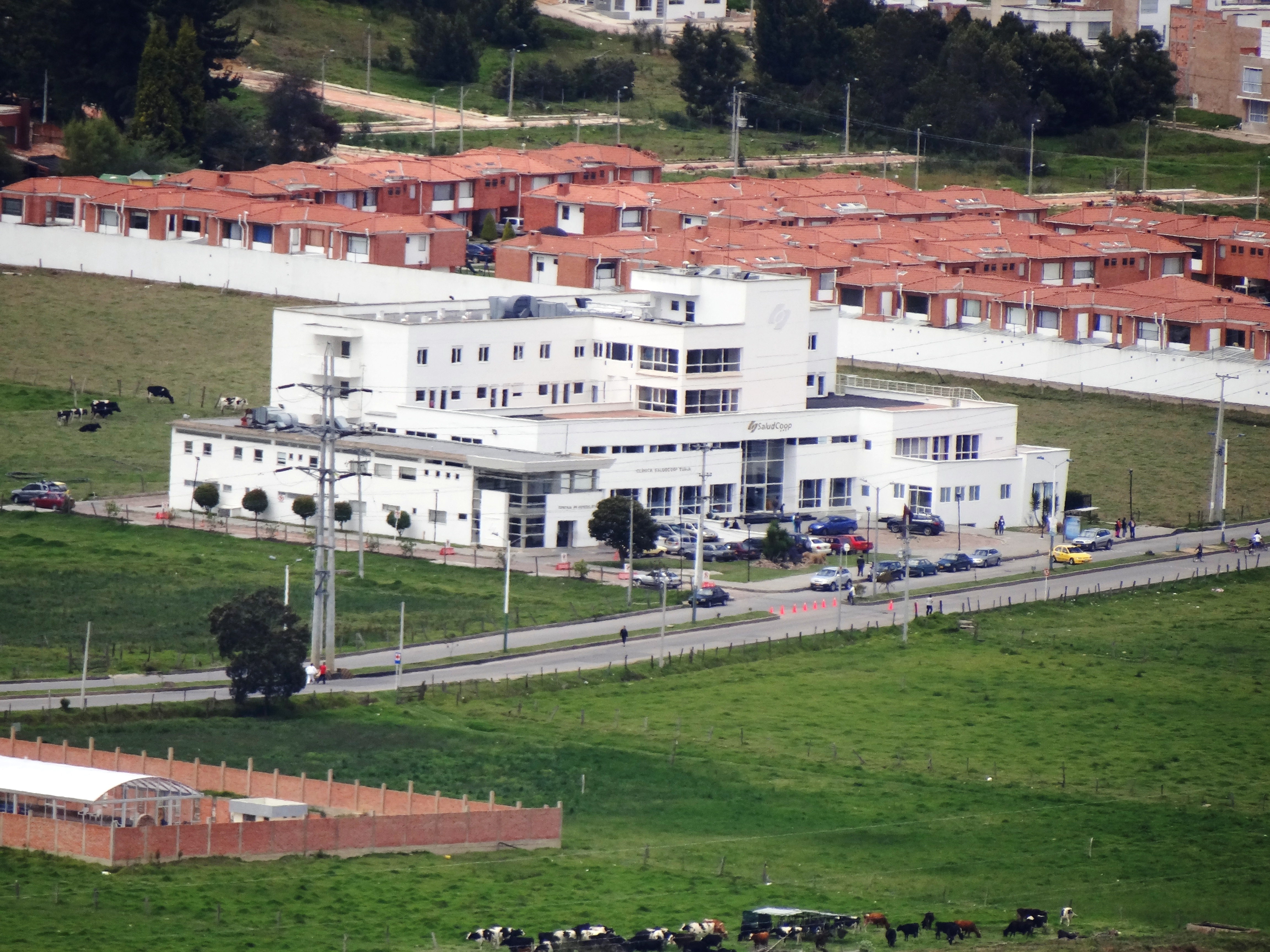 Clínica de Saludcoop, en la ciudad de Tunja, departamento de Boyacá, Colombia.